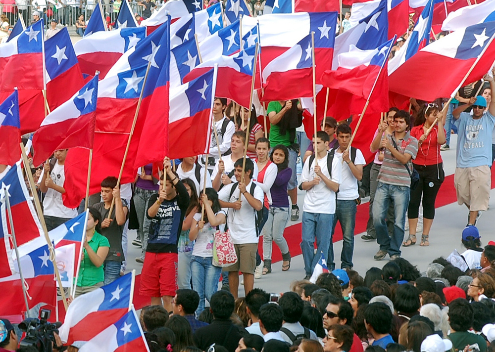 21 noviembre 2010. En el Santuario Nacional de Maipú se celebró con miles de personas la "Misa por Chile"